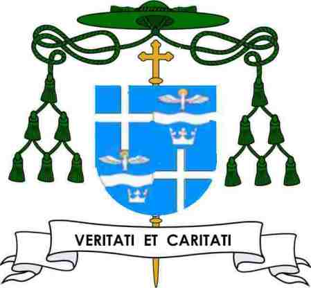 Wappen Josef Wendel, 1901-1960, Bischof von Speyer (1943-1952)